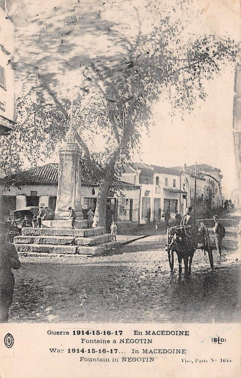 Неготино през Първата световна война.